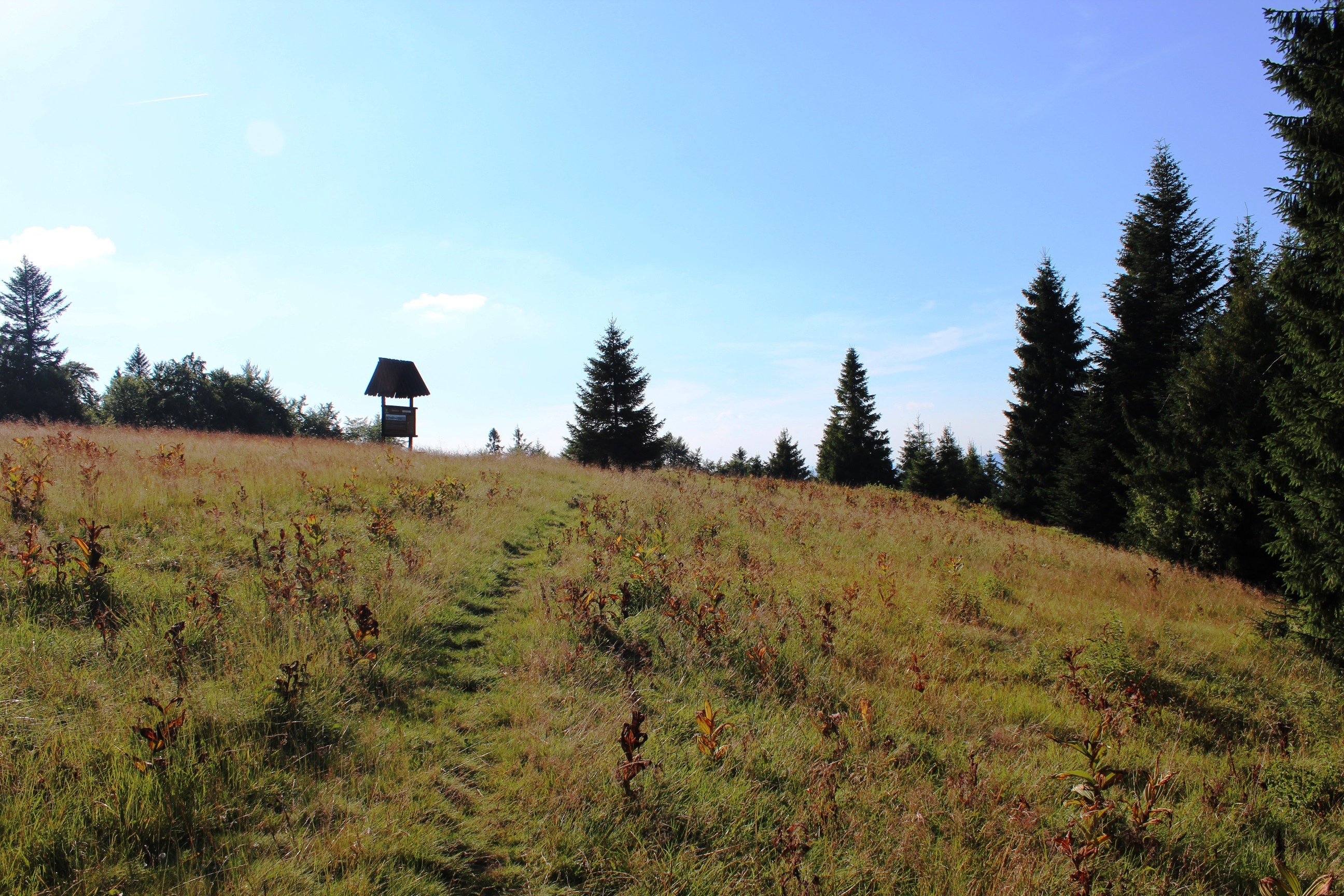 Polana Średnie